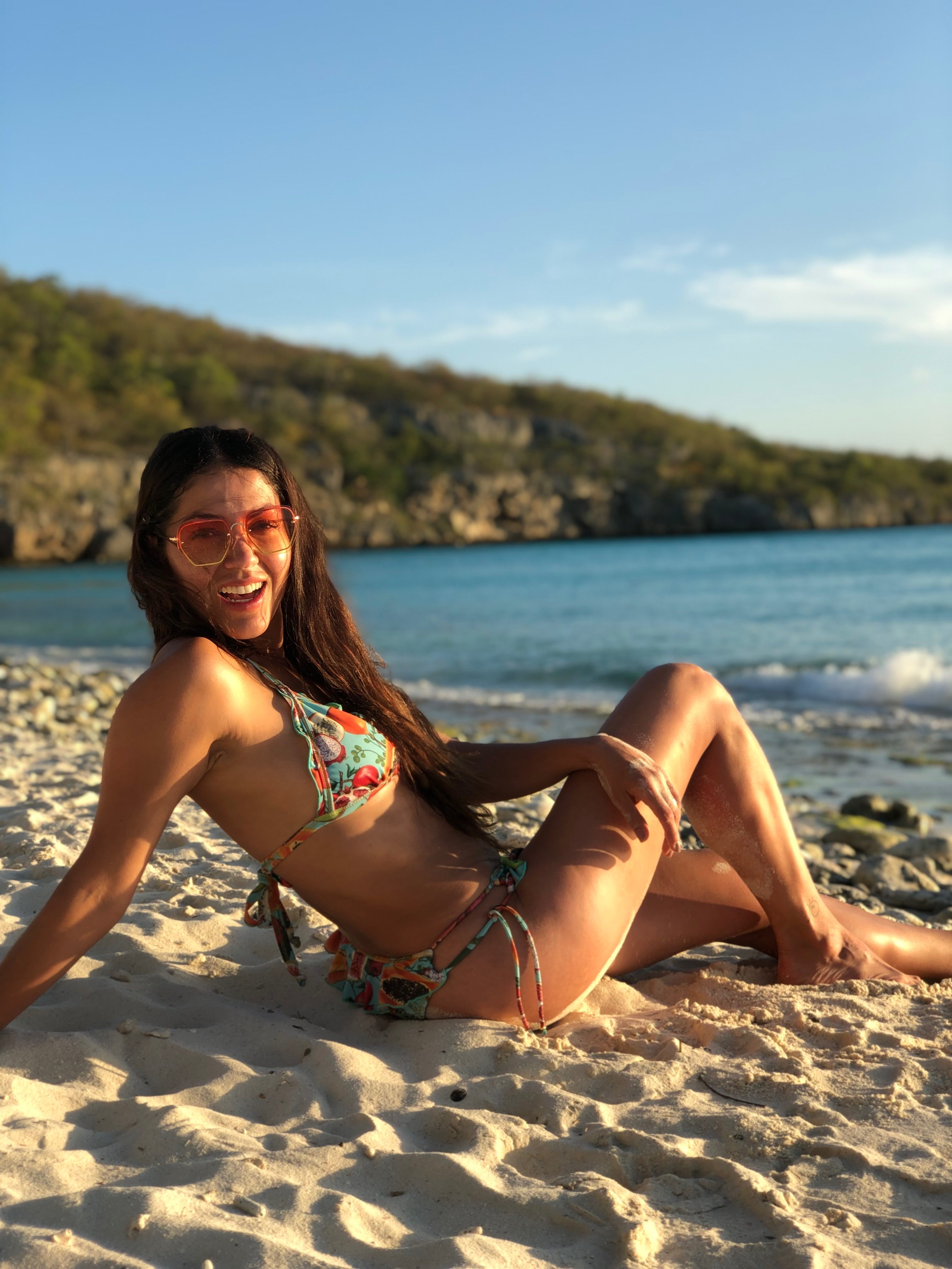 Lina en La Playa